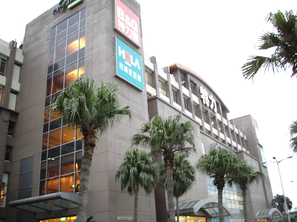 特力屋內湖店，地址：臺北市內湖區新湖三路23號B1。